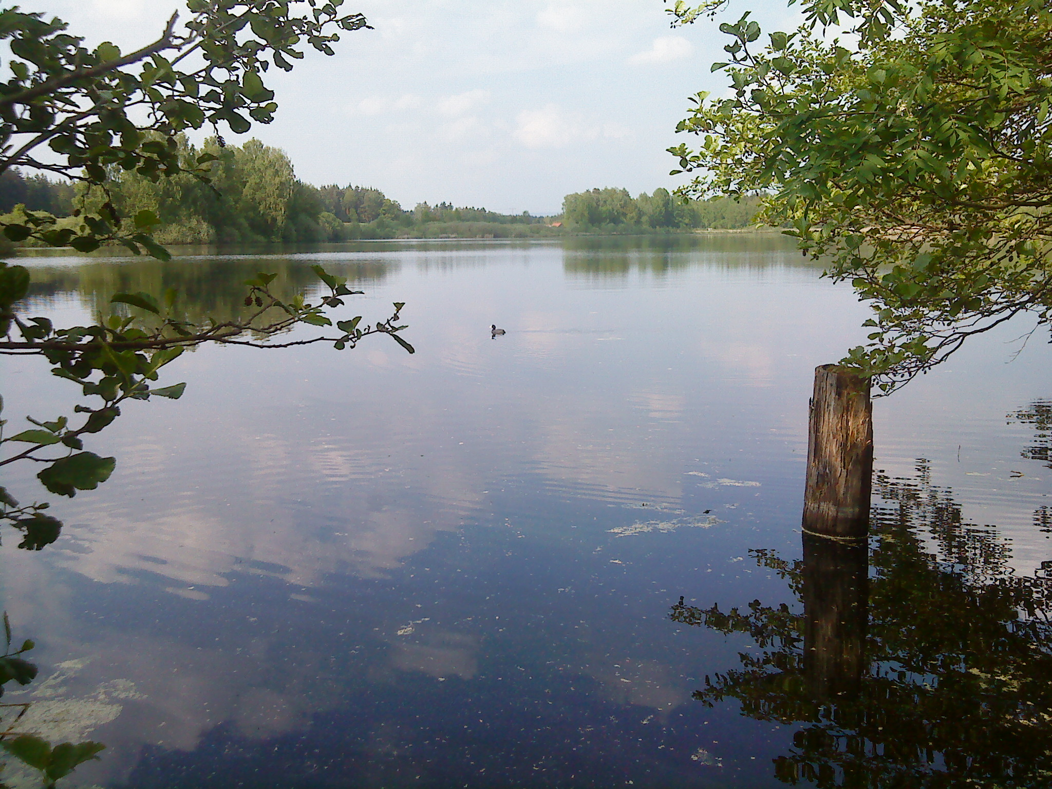 Der Craimoosweiher bei Schnabelwaid